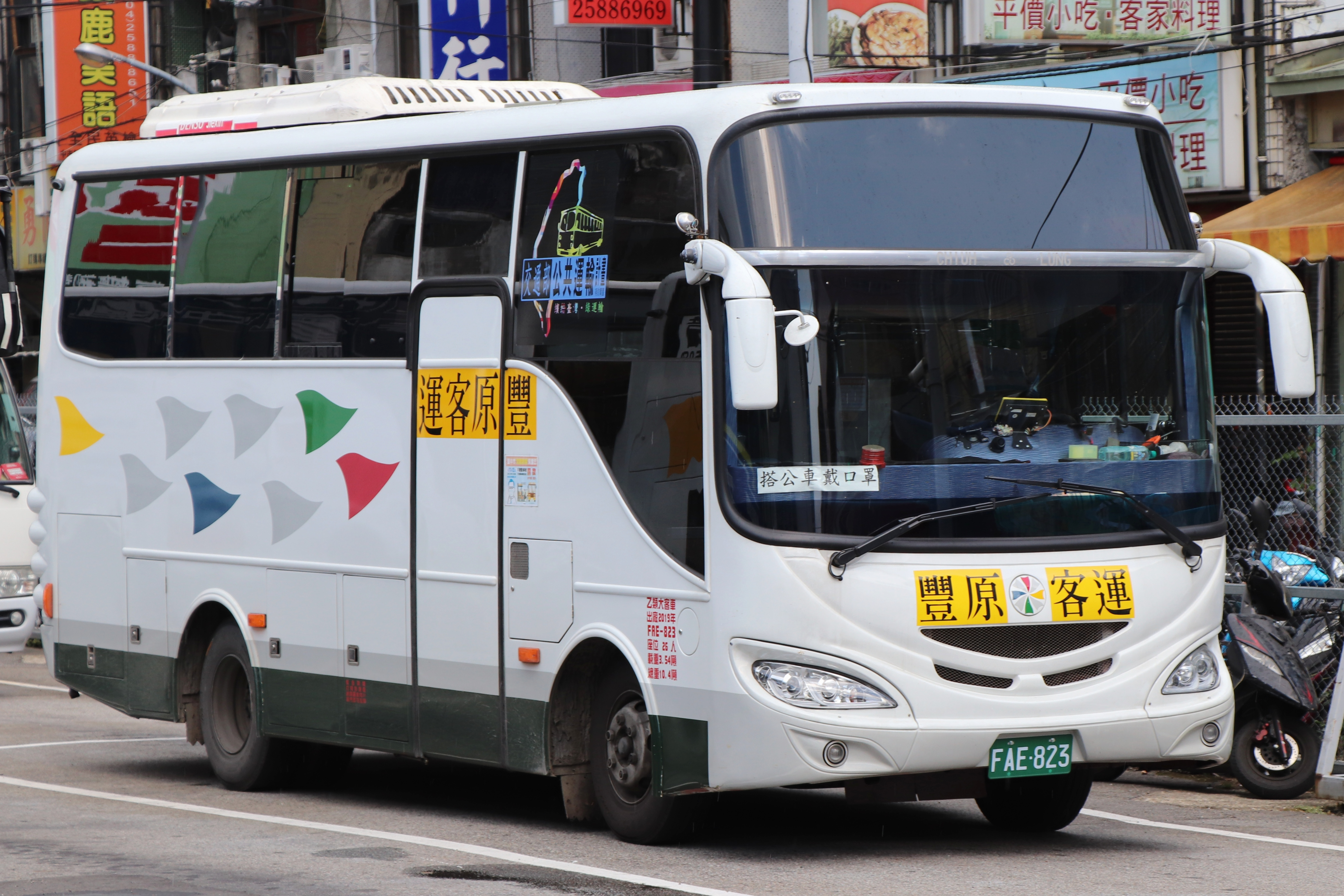 豐原客運 HINO FC7JTGZ大客車 FAE-823